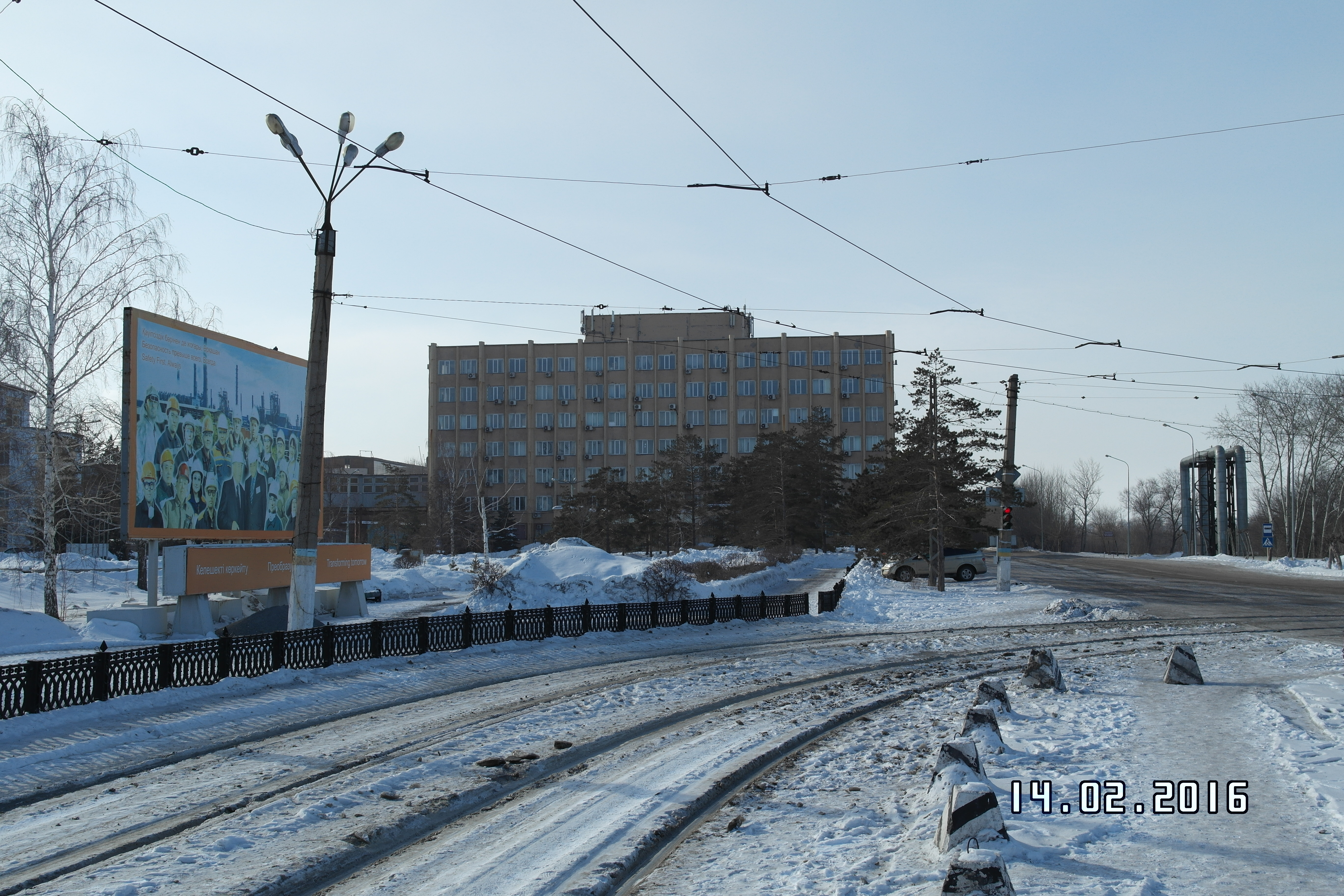 Инженерный корпус Карагандинского металлургического комбината